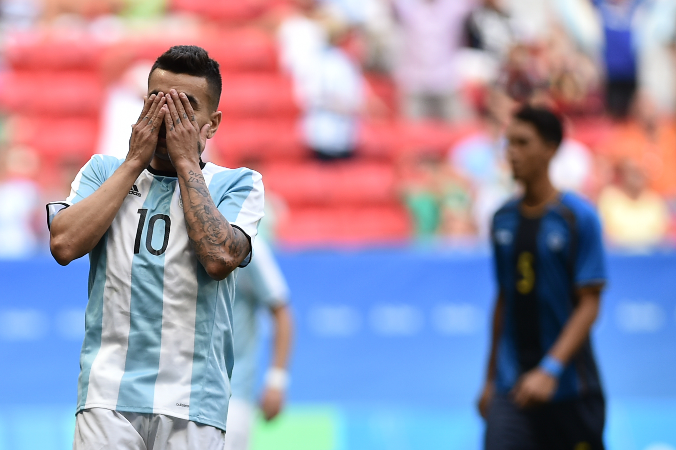 Estádio Nacional de Brasília Mané Garrincha, Brasília, DF, Brasil, 10/8/2016 Foto: Andre Borges/Agência Brasília Argentina e Honduras empataram por 1x1 nesta quarta-feira (10), no Estádio Mané Garrincha, em partida pelo grupo D do futebol masculino nas Olimpíadas 2016. O placar classificou Honduras para a próxima fase da competição e tirou a seleção argentina masculina da Olimpíada. Partido entre Argentina y Honduras por fase de grupos.